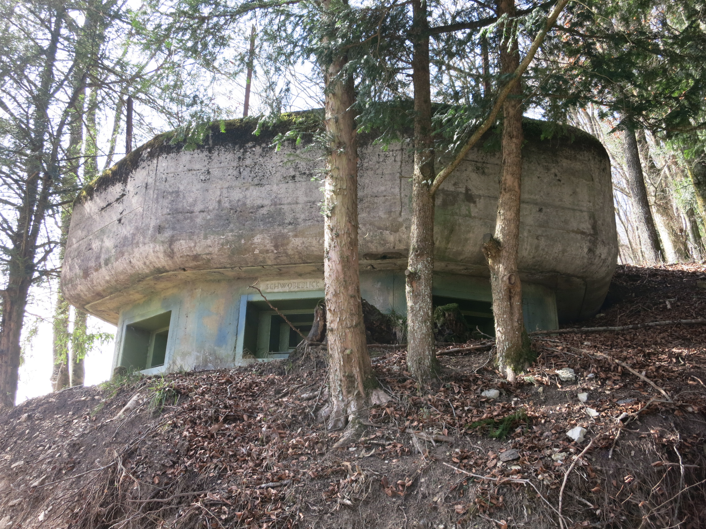 Sperrstelle Viligen AG, Schweiz